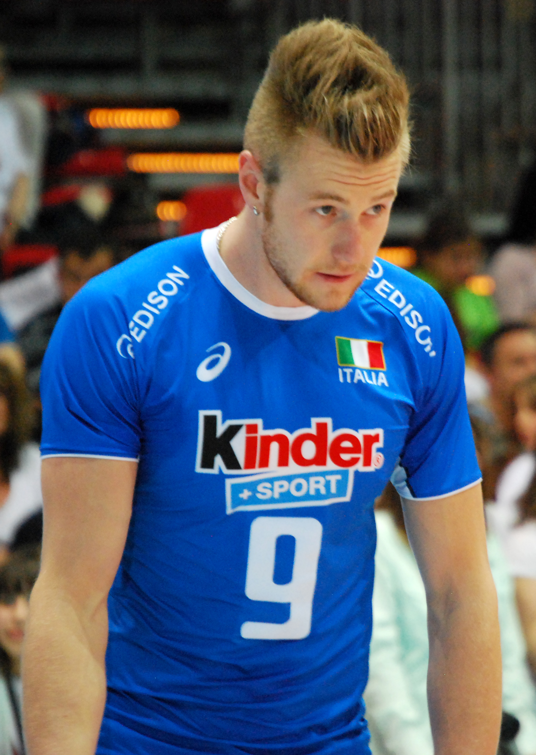 Ivan Zaytsev